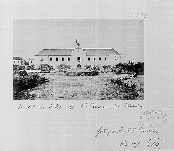 L'hôtel de ville de Saint-Pierre avant 1885.